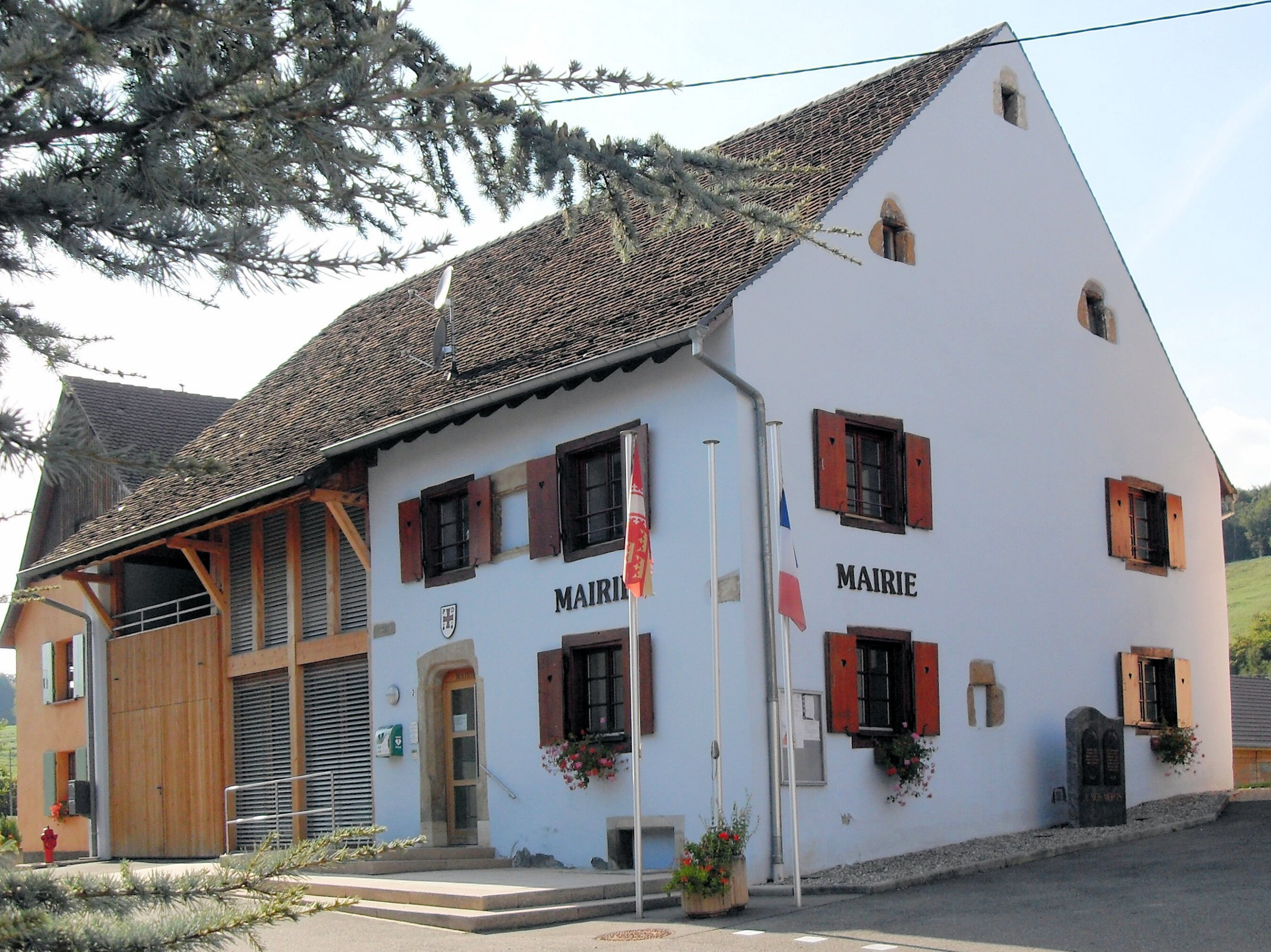 La mairie de Bendorf